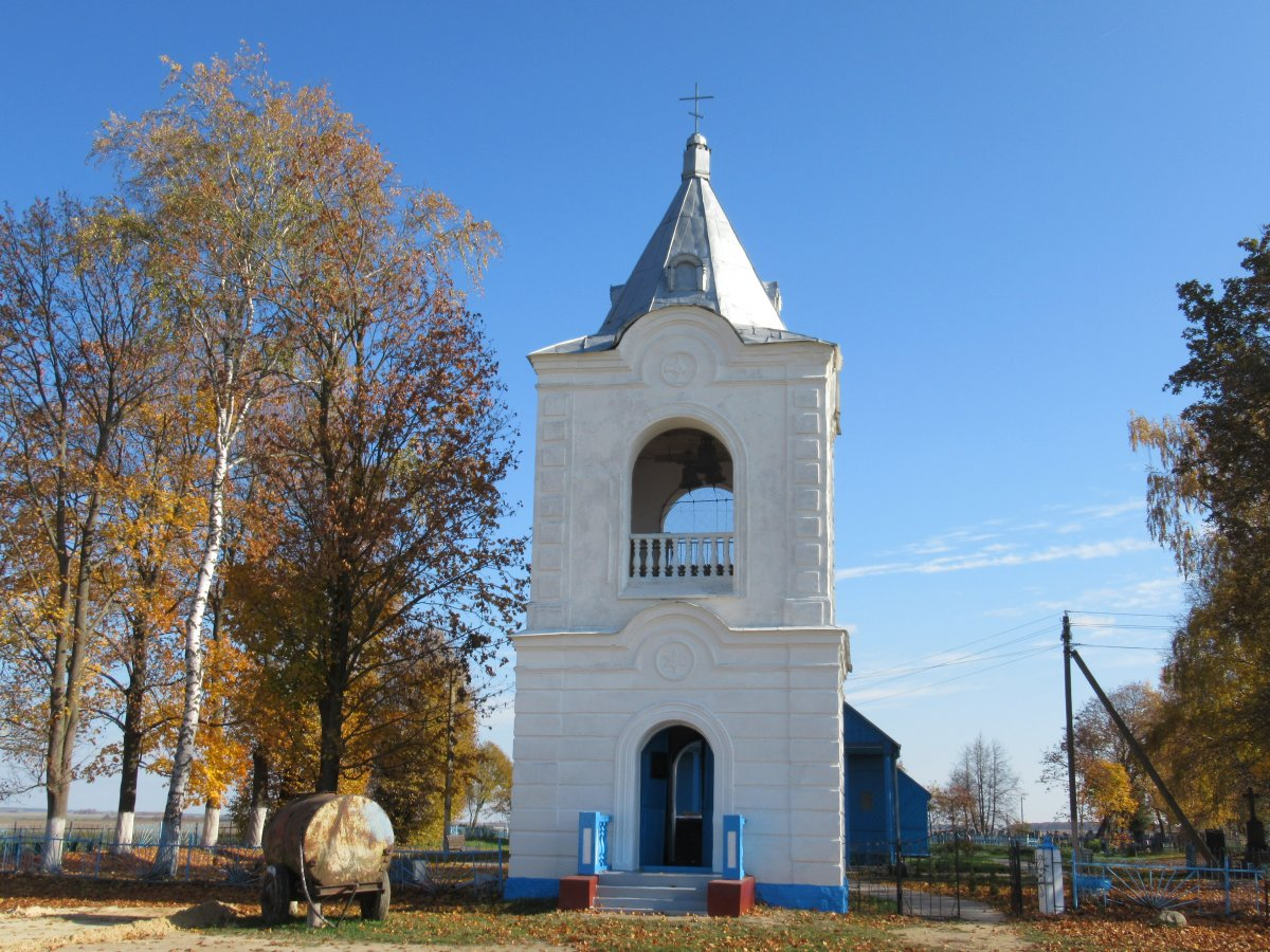 Падлессе (Ляхавіцкі раён). Свята-Духаўская царква